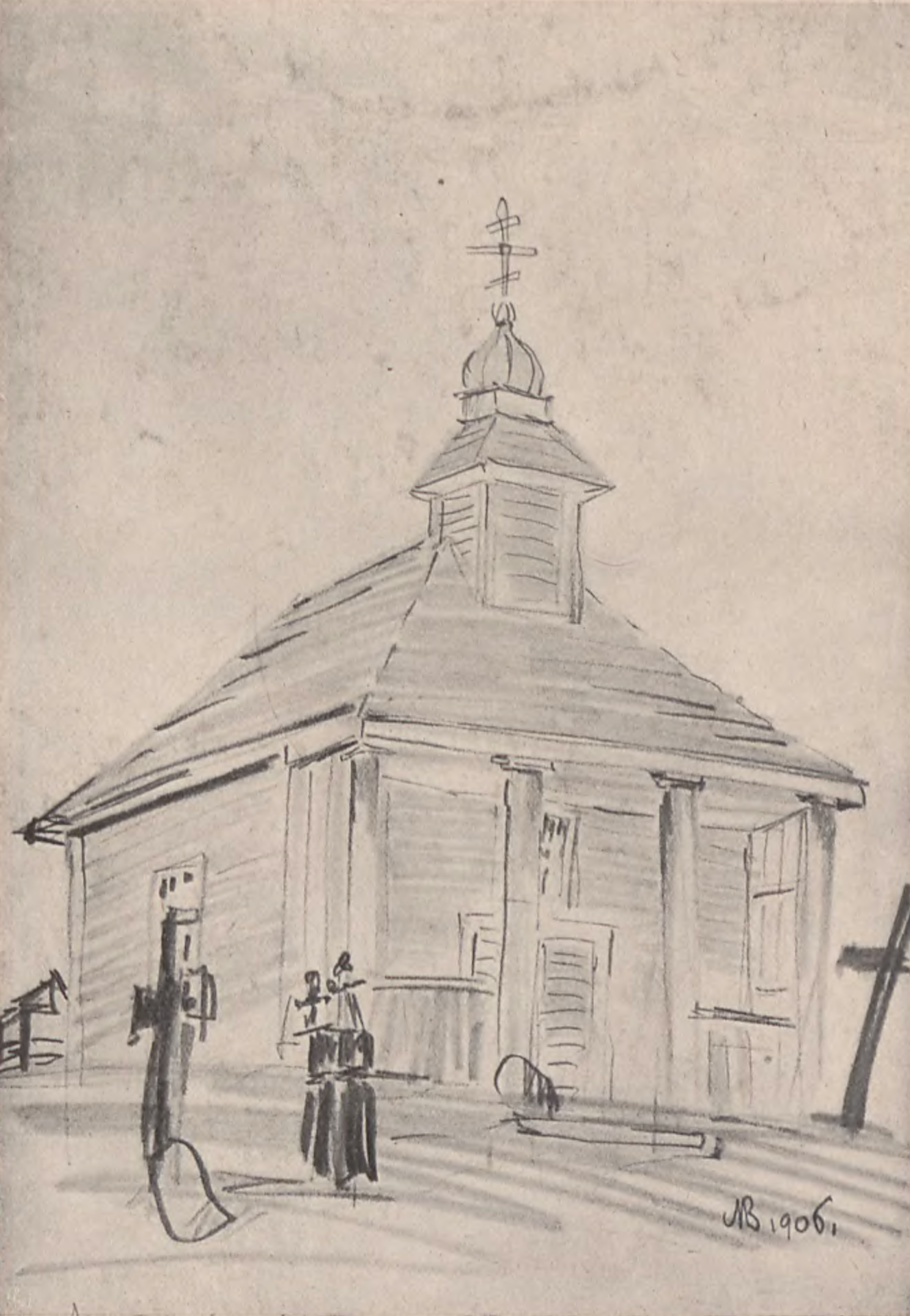 Беларуская (тарашкевіца): Сянежыцы (Sianiežycy). Капліца